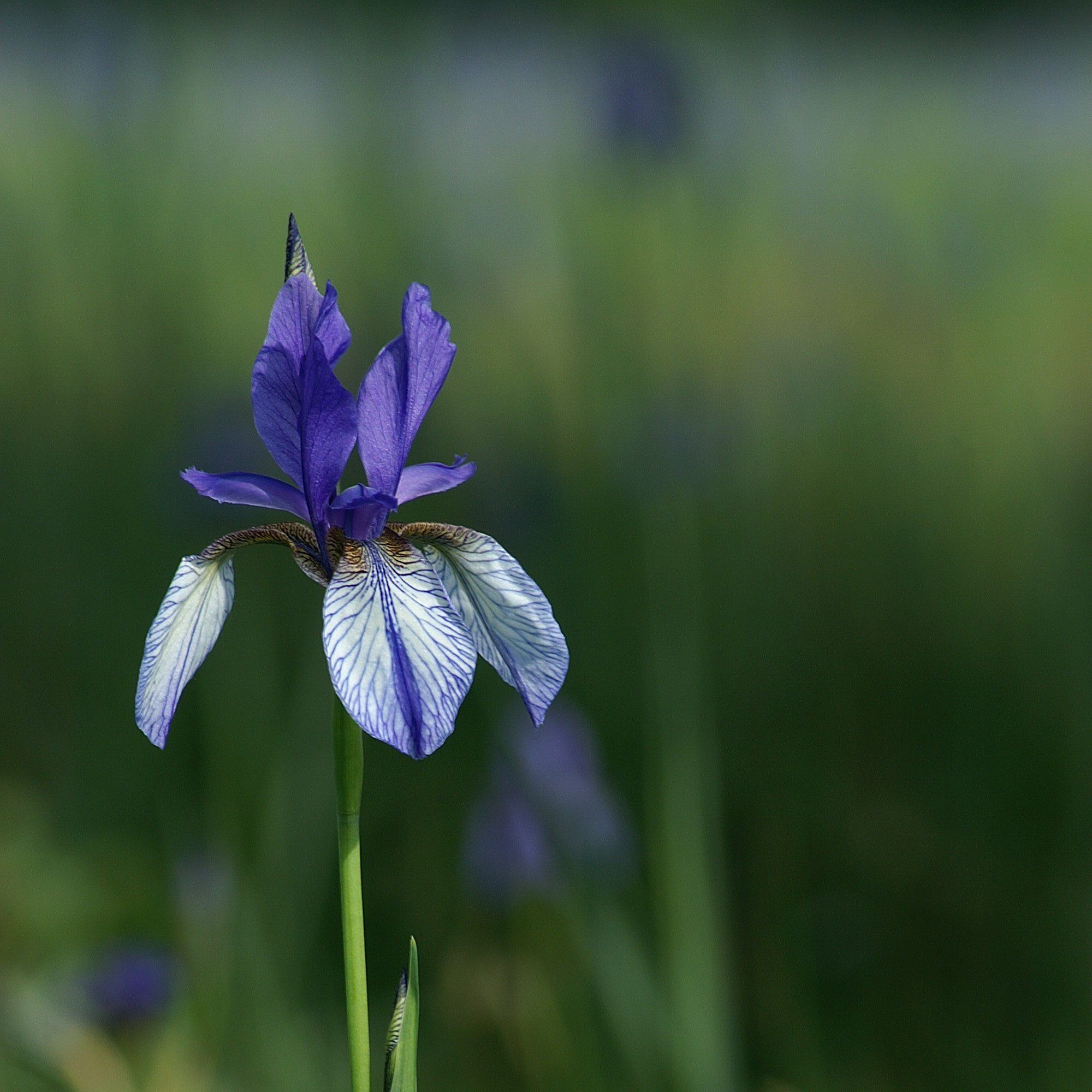 Die Sibirische Schwertlilie (Iris sibirica), auch Wiesen-Iris, Wiesen-Schwertlilie oder Sibirische Iris genannt, ist eine Pflanzen-Art aus der Familie der Schwertliliengewächse (Iridaceae). Die Art steht unter Naturschutz.